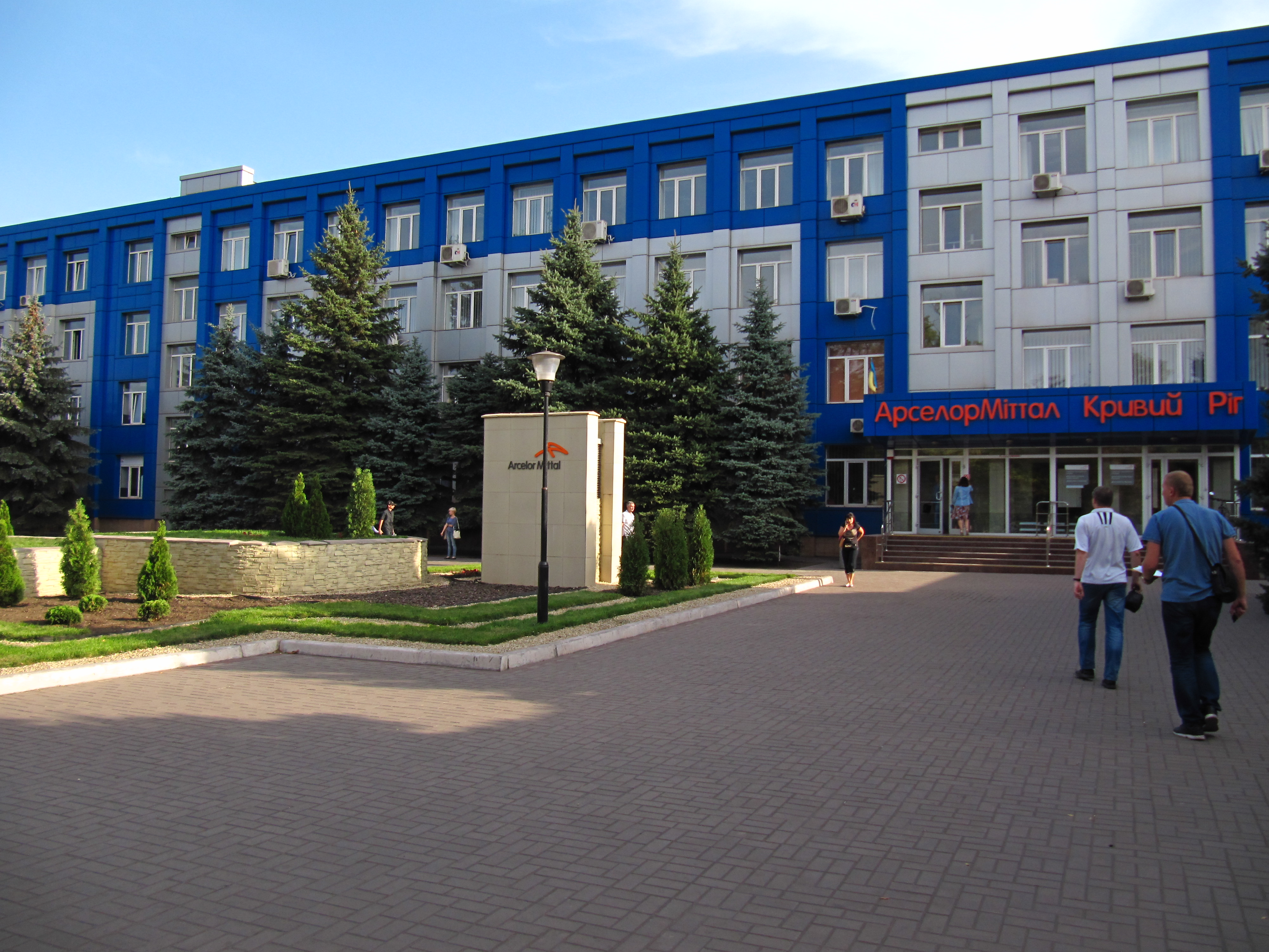 Пам’ятний знак на споруді, в якій працював керівник будівництва та перший директор Криворізького металургійного заводу ім. Леніна Я.І.Вєснік, Кривий Ріг, вул. Орджонікідзе, 1. Нині вулиця Криворіжсталі. На фото - будівля де розміщено відділ кадрів АМКР. Дану адресу носить саме ця споруда, проте меморіальних дошок споруда не містить. Вона обшивалась фасадним утепленням, можливо дошка під ним. Робітники заводу не можуть згадати таку дошку десь на території. Територія заводу чимала, проте адміністративних будівель небагато, і ця - одна з небагатьох які потенційно підходять під опис. До того ж є обмеження - всі інші знаходяться на закритій території де знаходження сторонніх і фотографування заборонені. В цілому на даний момент виявити місце розташування дошки не вдалося, як і підтвердити її існування і стан.